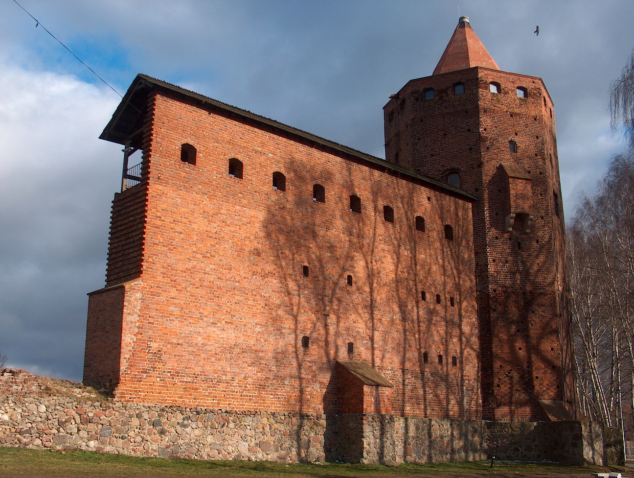 Rawa Mazowiecka, zamek książąt mazowieckich (ruina), XIV, XVIII, XX